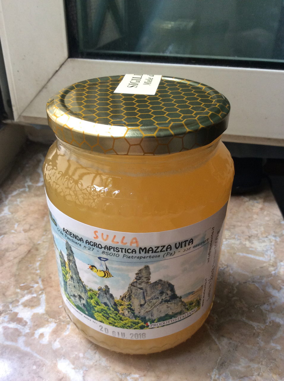 Un barattolo di miele di sulla prodotto a Pietrapertosa (PZ)